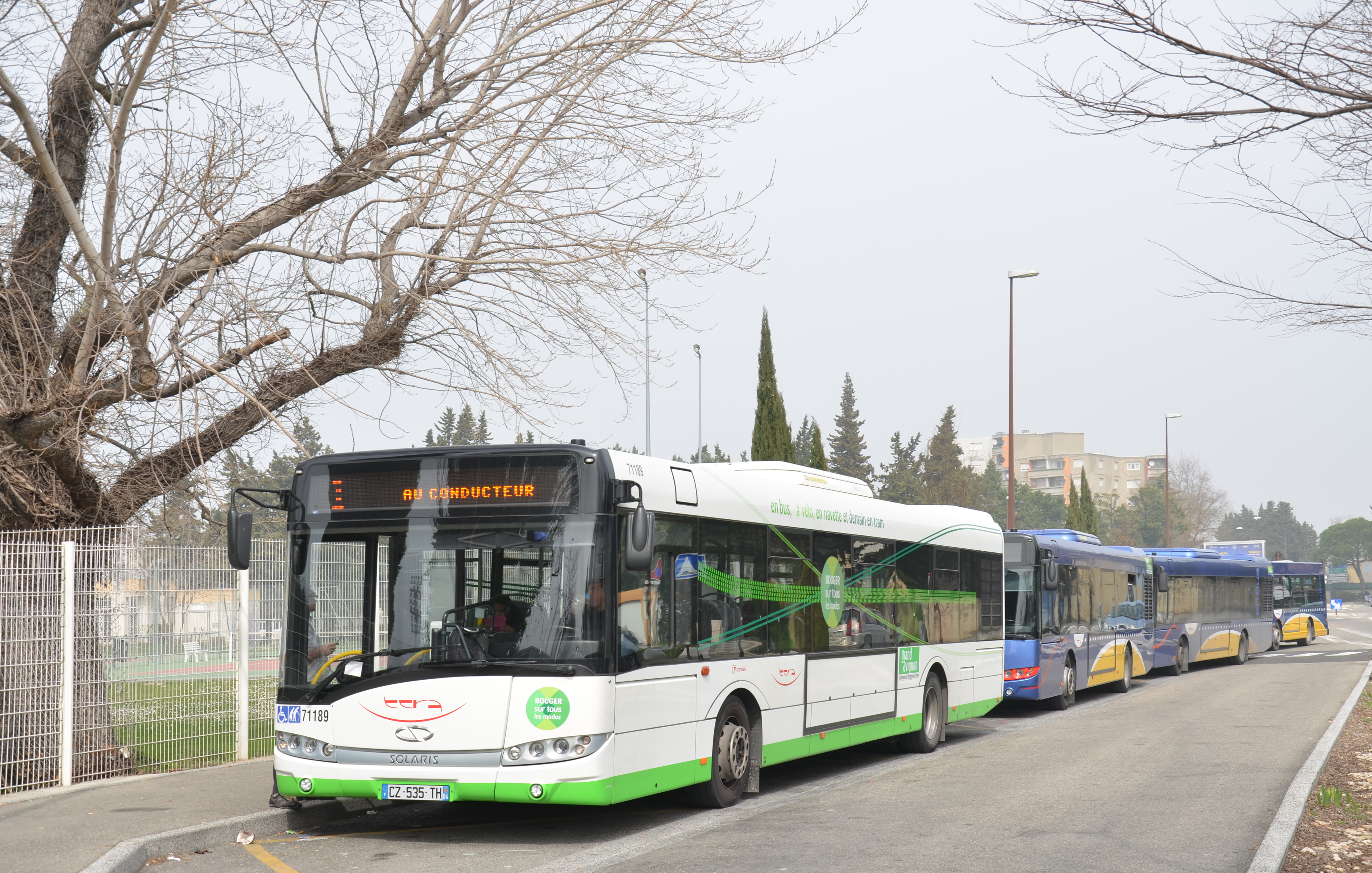 Solaris Urbino 12 n°71189 et 3 autres véhicules (2 Solaris et un GX 117L) au terminus Saint-Chamand.